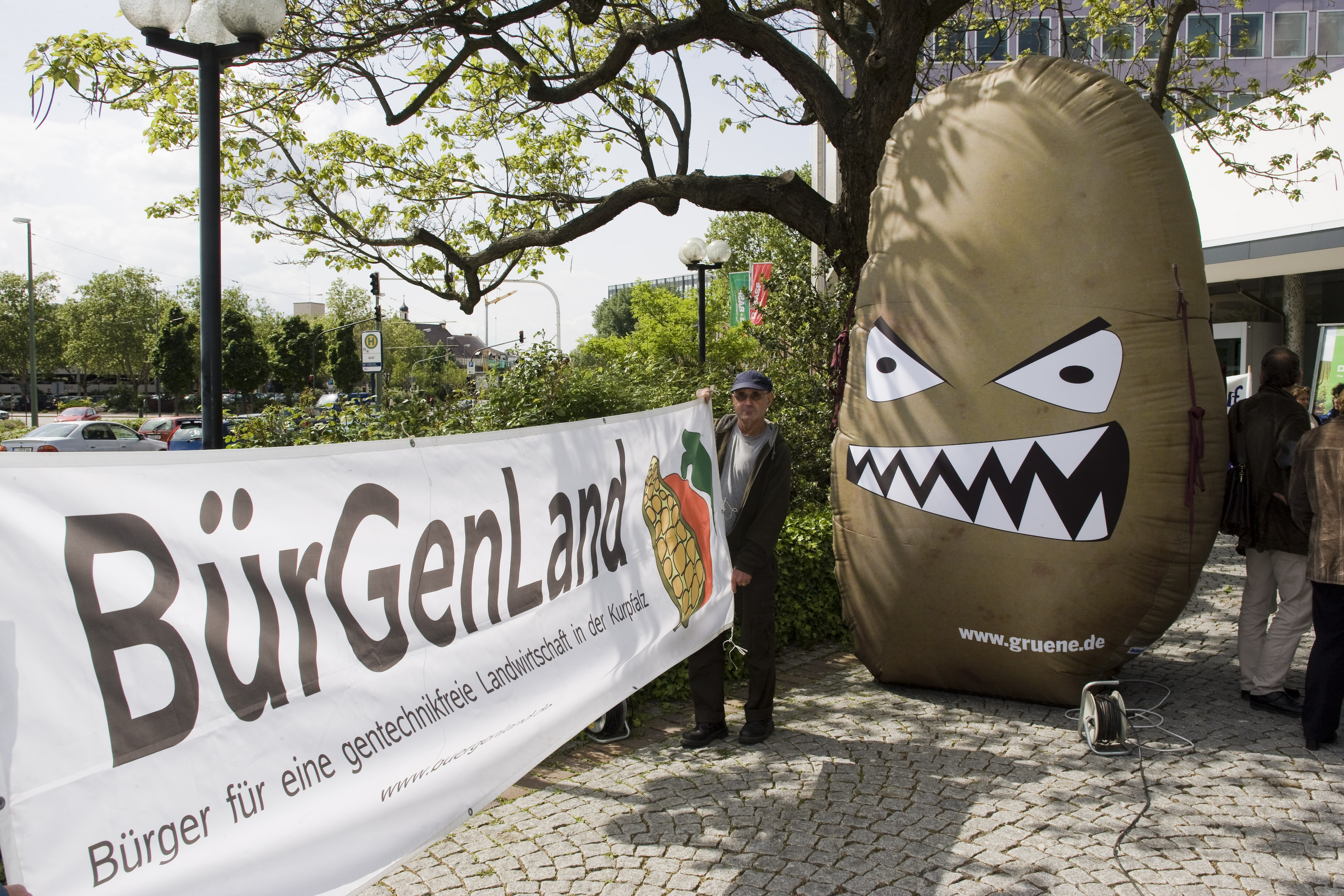 Mit einem Aktionstheater und der Übergabe einer Protesturkunde demonstrierten Bündnis 90/Die Grünen sowie verschiedene Naturschutz- und Bauernverbände Mitte Mai gegen Amflora vor dem BASF-Hauptsitz in Ludwigshafen.